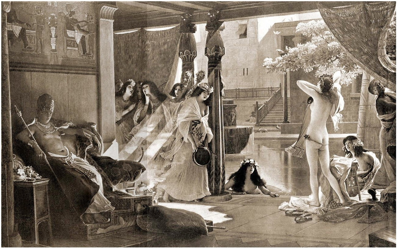 Tristesse de Pharaon